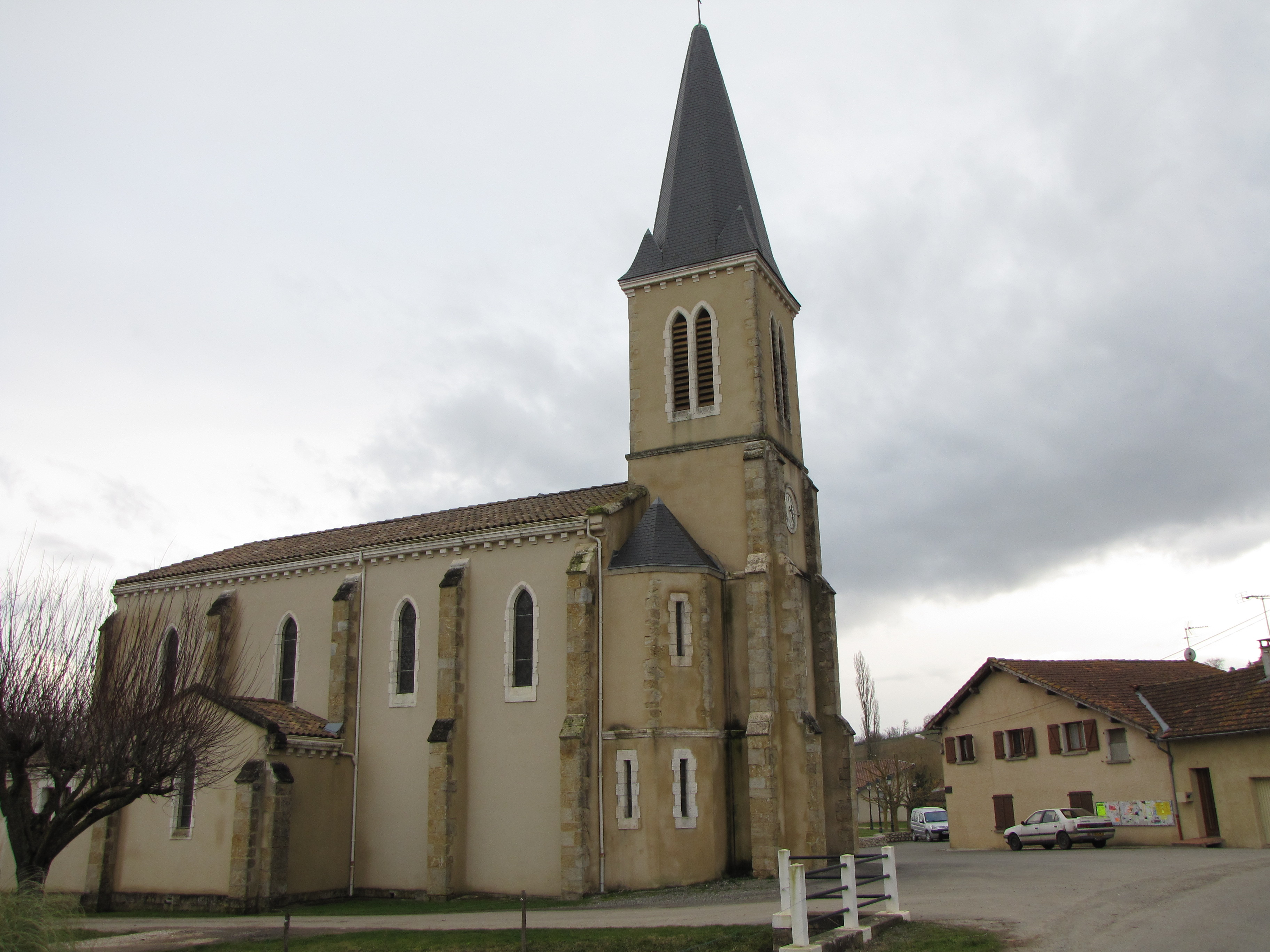 Église de Labastide-Paumès (Haute-Garonne, France).